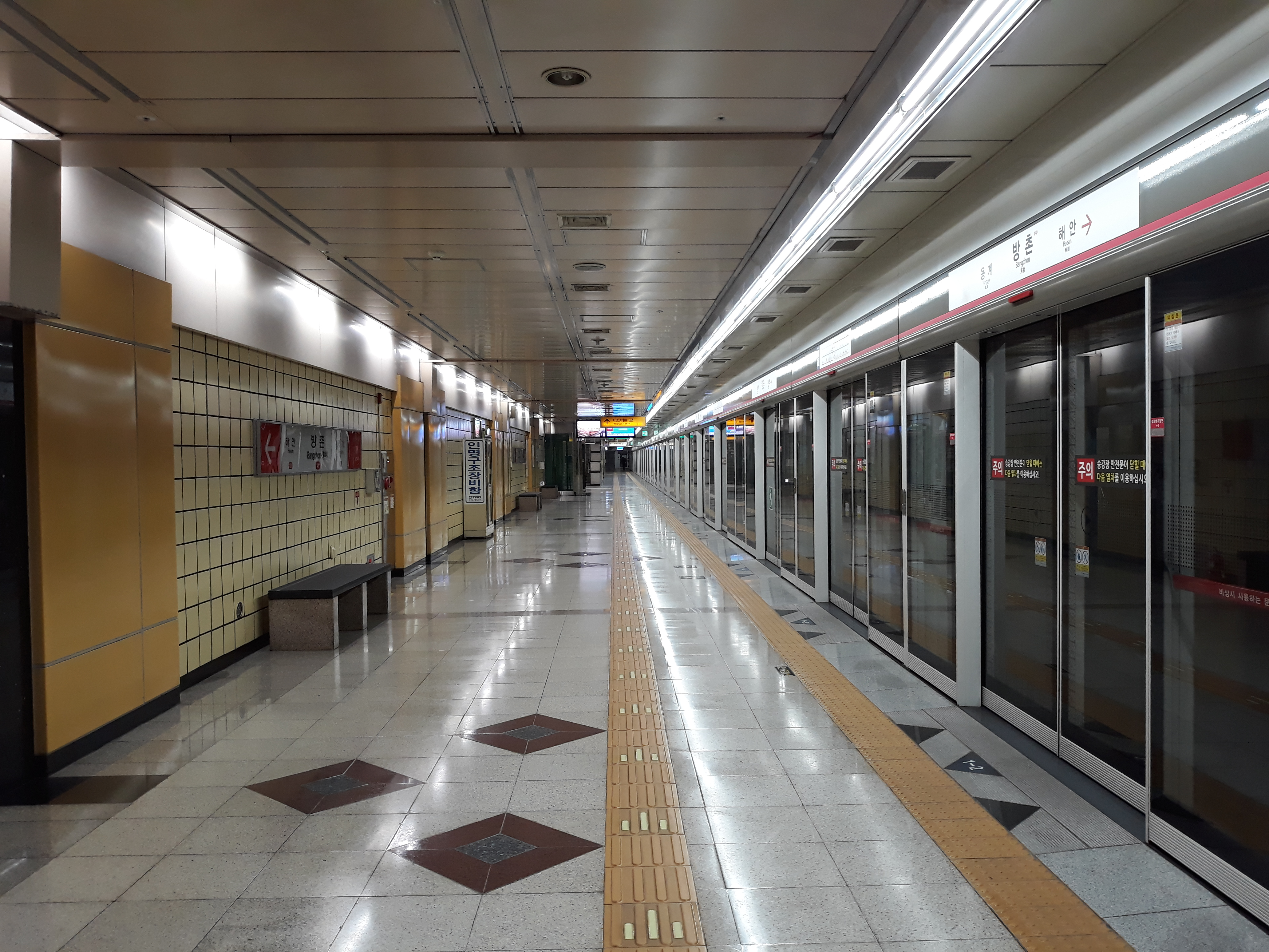 대구 도시철도 1호선 방촌역 설화명곡 방면 승강장